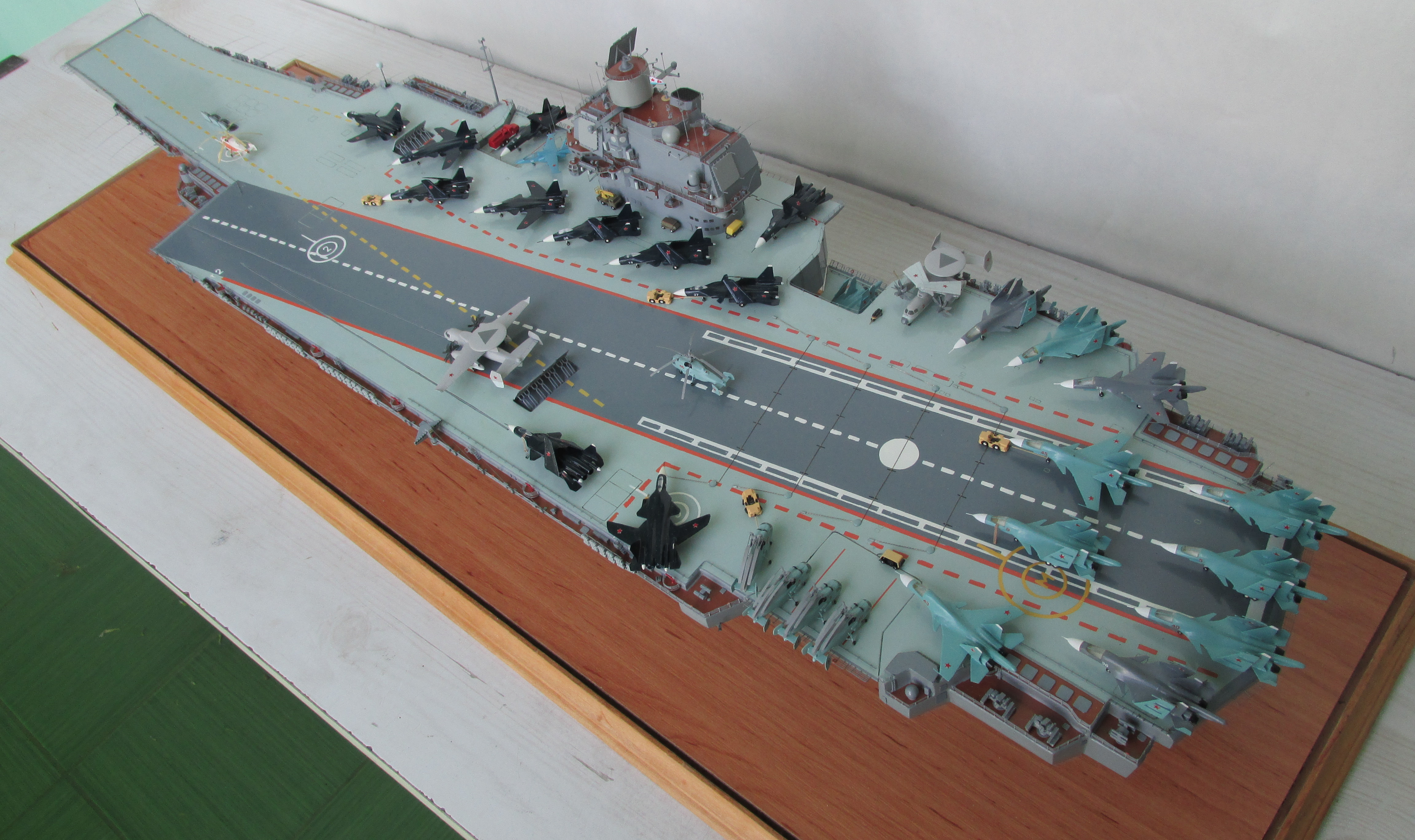 Автор модели - Мирошник Валерий Александрович.